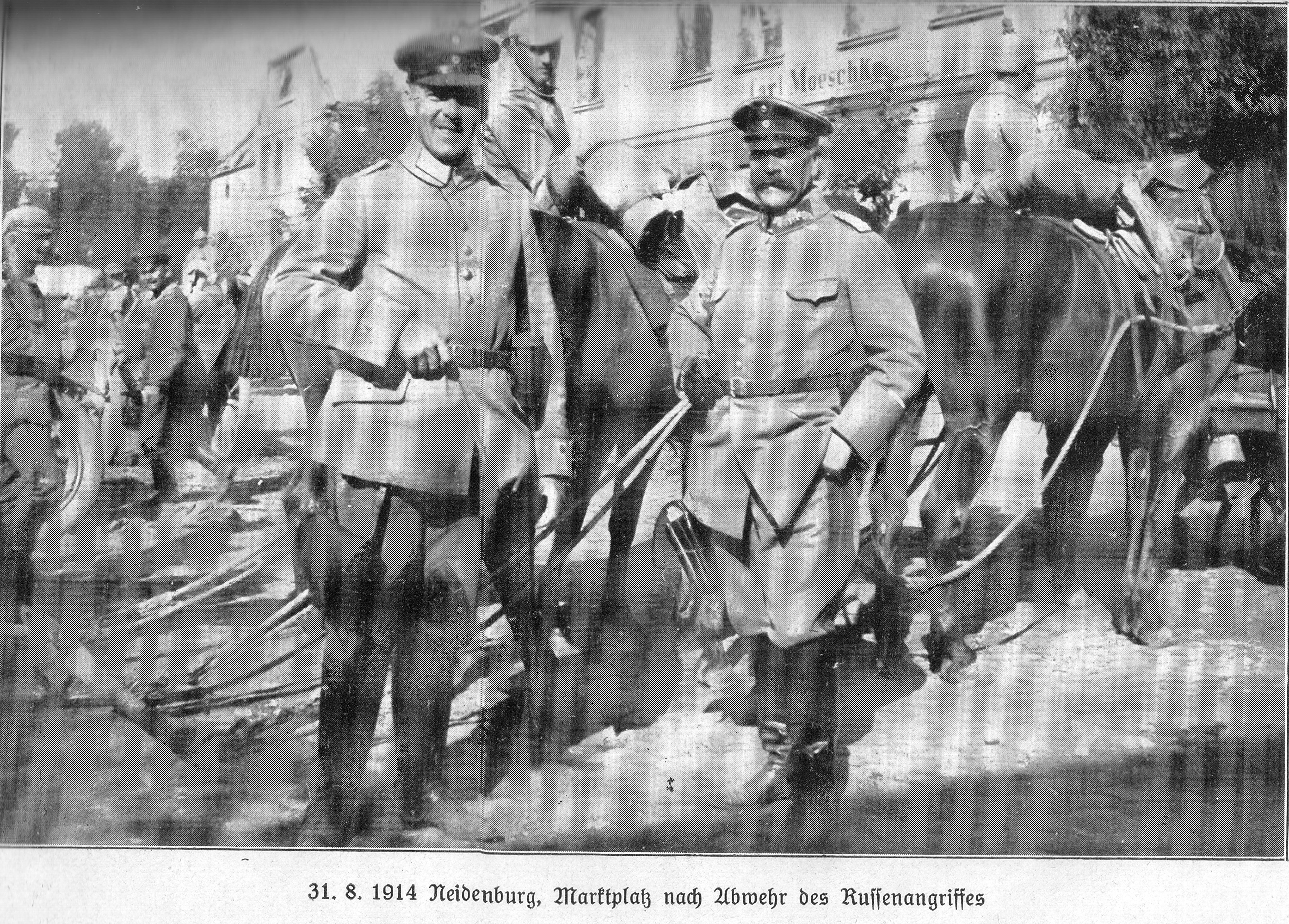 Neidenburg